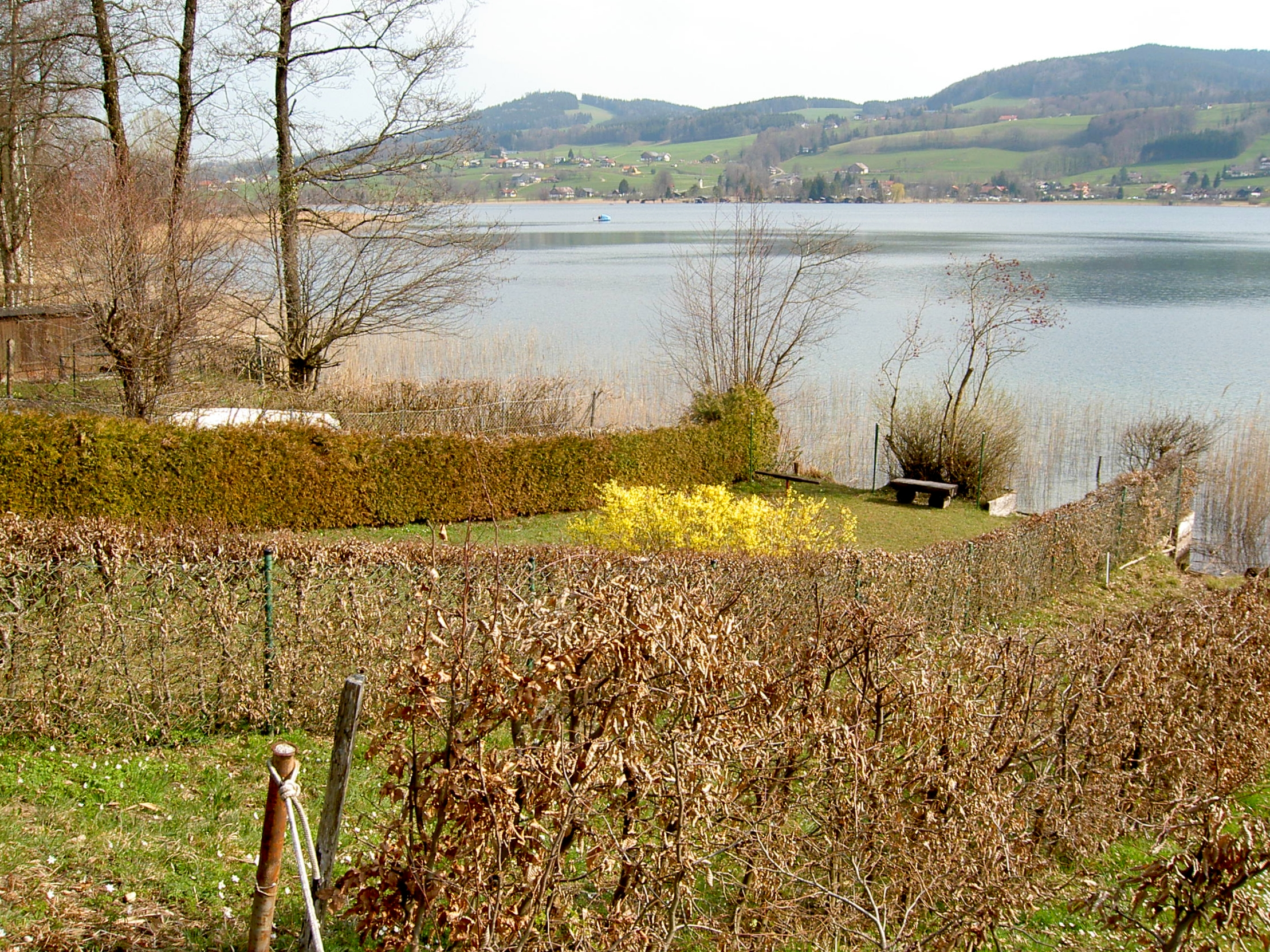 Blick auf den oberösterreichischen Irrsee von Westen